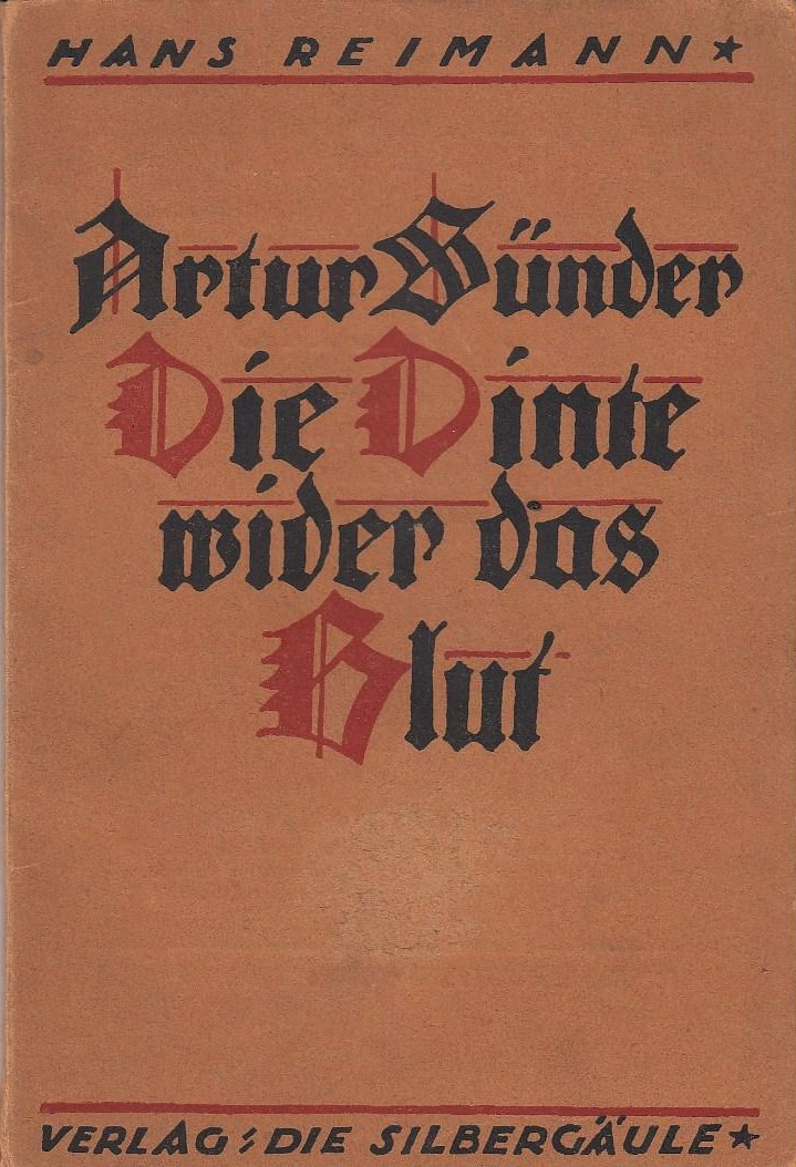 Hans Reimann, Artur Sünder. Die Dinte wider das Blut. Ein Zeitroman, 39. wildgewordene und vermasselte Auflage.640.-683. Tausend (= Erste Ausgabe), Paul Steegemann Verlag, Hannover, 1921 (Die Silbergäule 132-134).